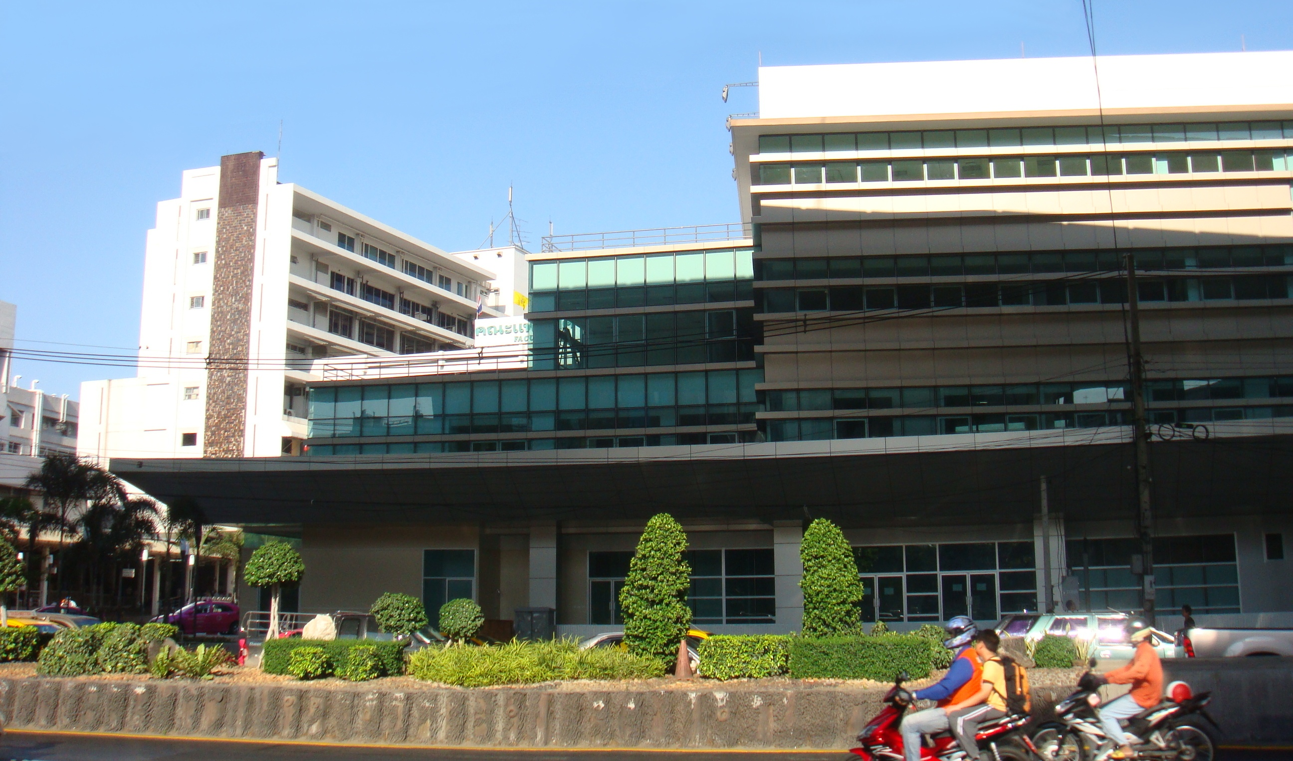 ภาพโรงพยาบาลรามาธิบดี